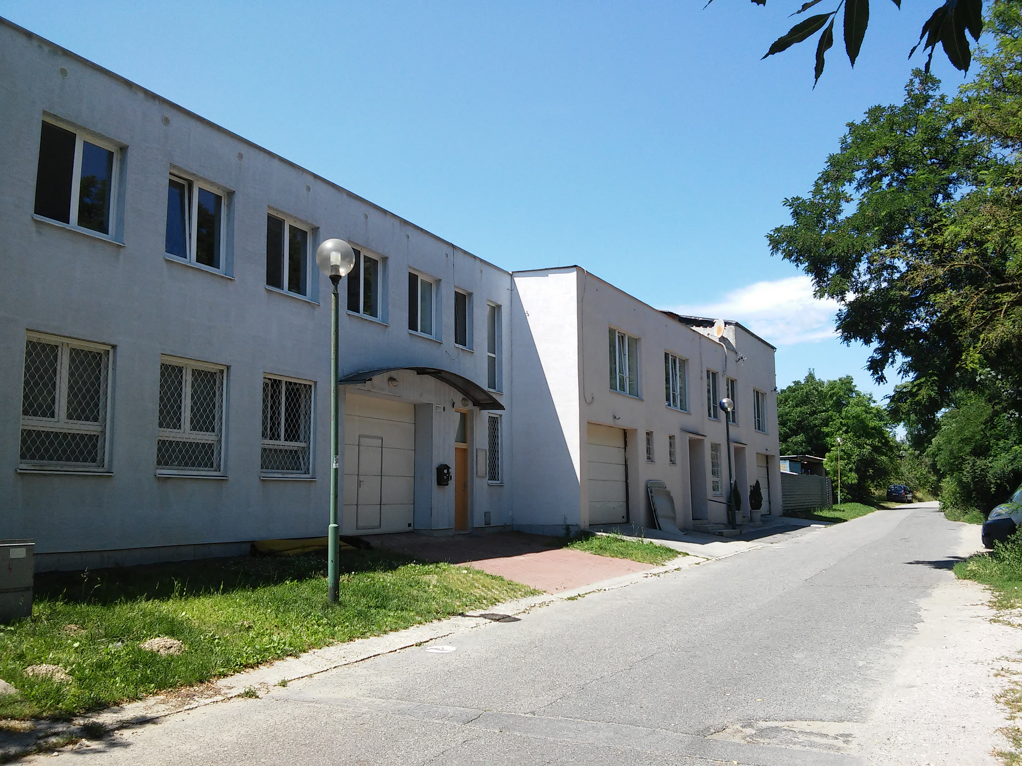 Furmanská, Lamač, Bratislava